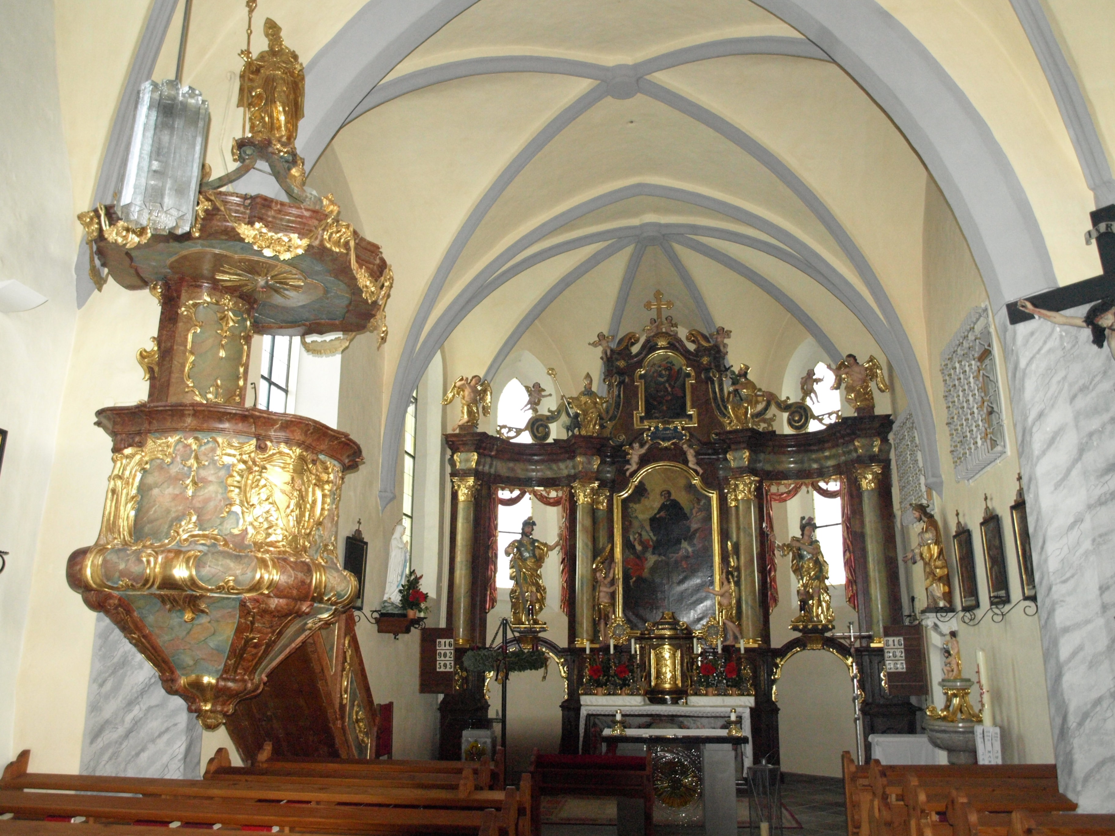 Kath. Pfarrkirche hl. Leonhard und Friedhof